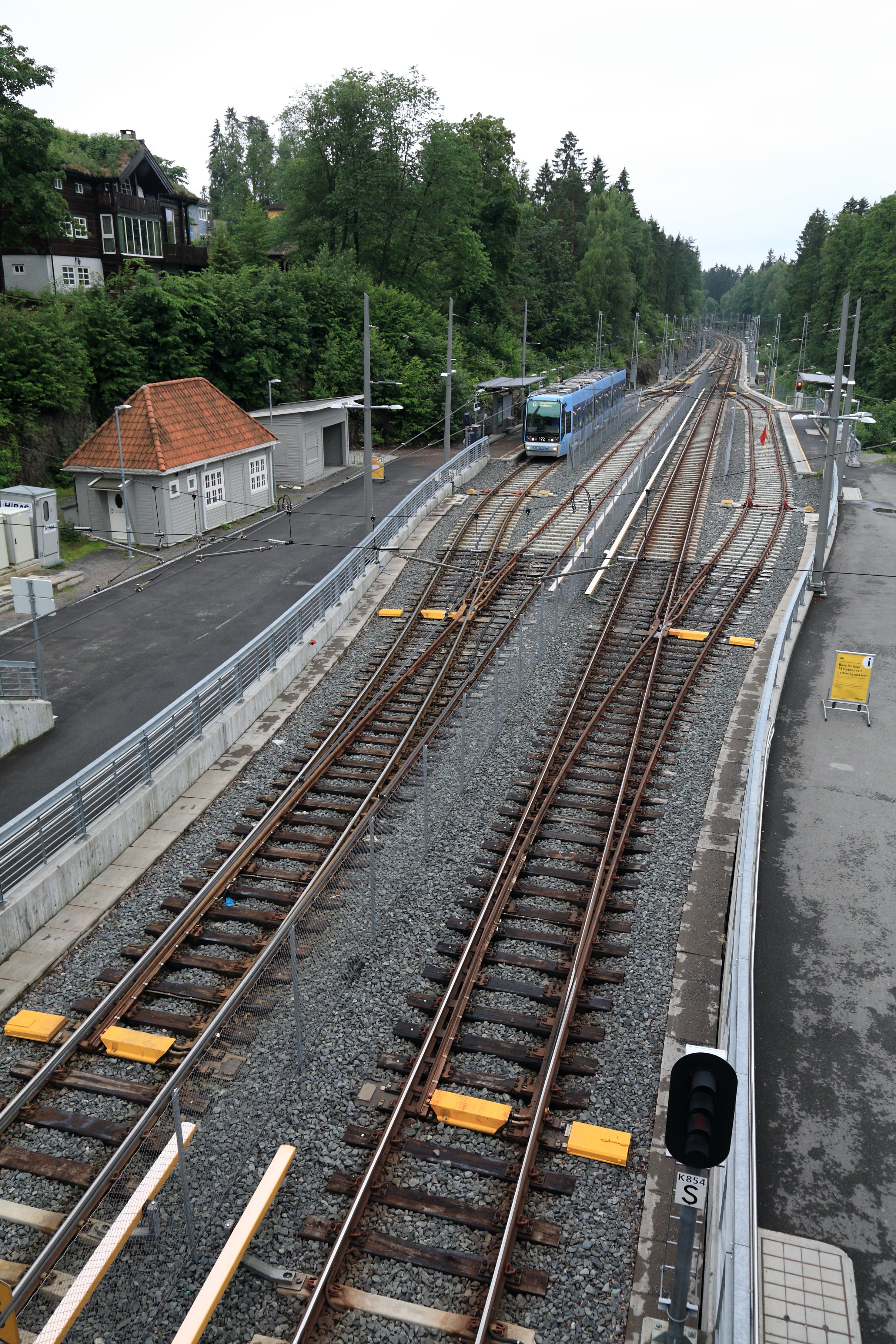 Bahnhof Jar, Bahnsteige für die Niederflurfahrzeuge der Straßenbahn. Wegen der Umstellung der Kolsåsbanen auf Stromschienenbetrieb, um Züge hier enden lassen zu können, obwohl die Wendeschleife abgebaut werden musste, wurden für die Straßenbahnzüge gesonderte Bahnsteiggleise angelegt. Die durchgehenden Hauptgleise sind ebenfalls mit Fahrleitung überspannt. Im Sommer 2013 enden die Züge der Linie 13 hier und verkehren nur auf dem Gleis ganz links.